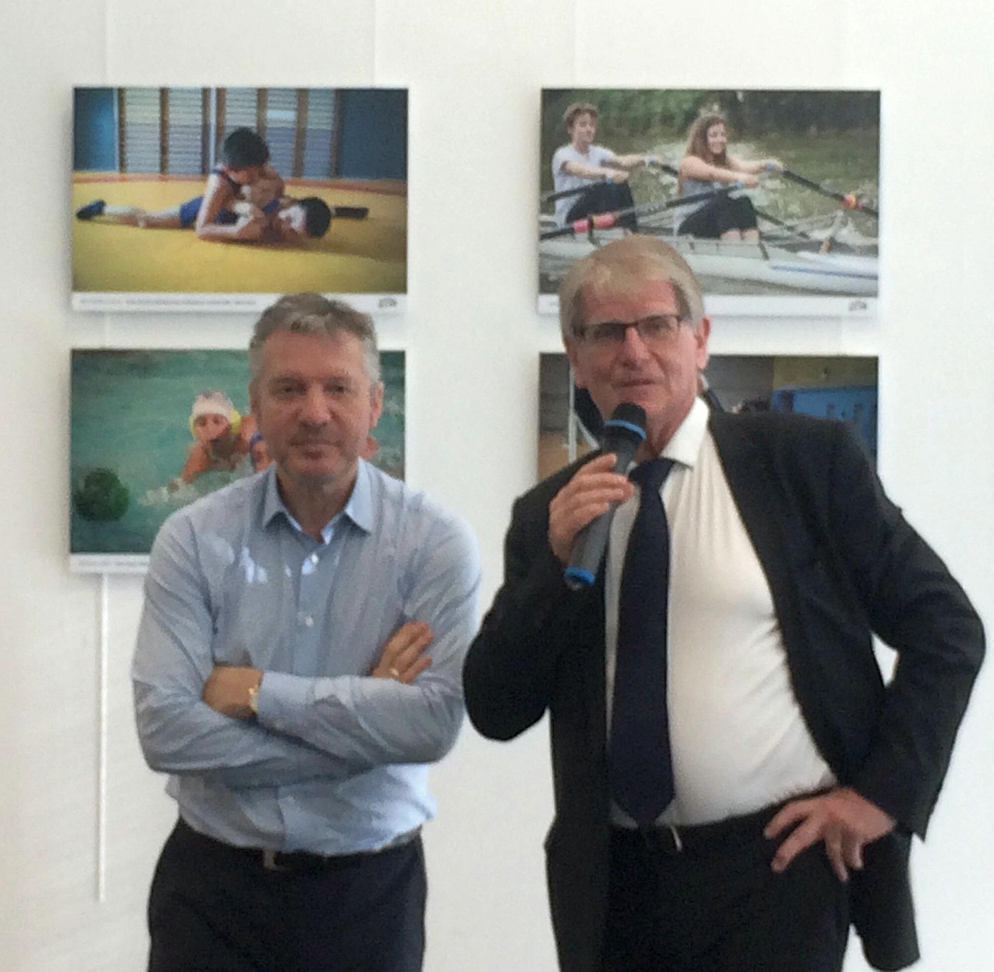 Le champion olympique de judo Thierry Rey (à gauche) avec Patrick Braouezec (au micro), président de Plaine commune dans les locaux de Plaine commune 21 rue Jules Rimet.